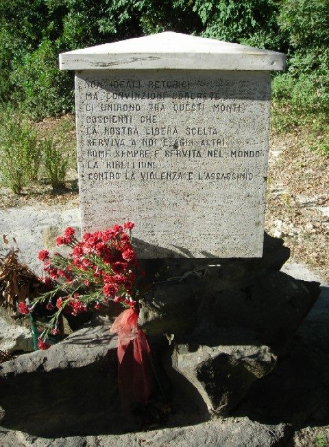 memorial of "Leoni" Partisan Brigade (1943-45), Castelleone, Deruta, Perugia, Umbria, Italy